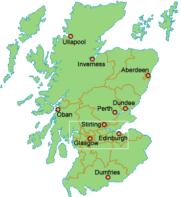 térkép